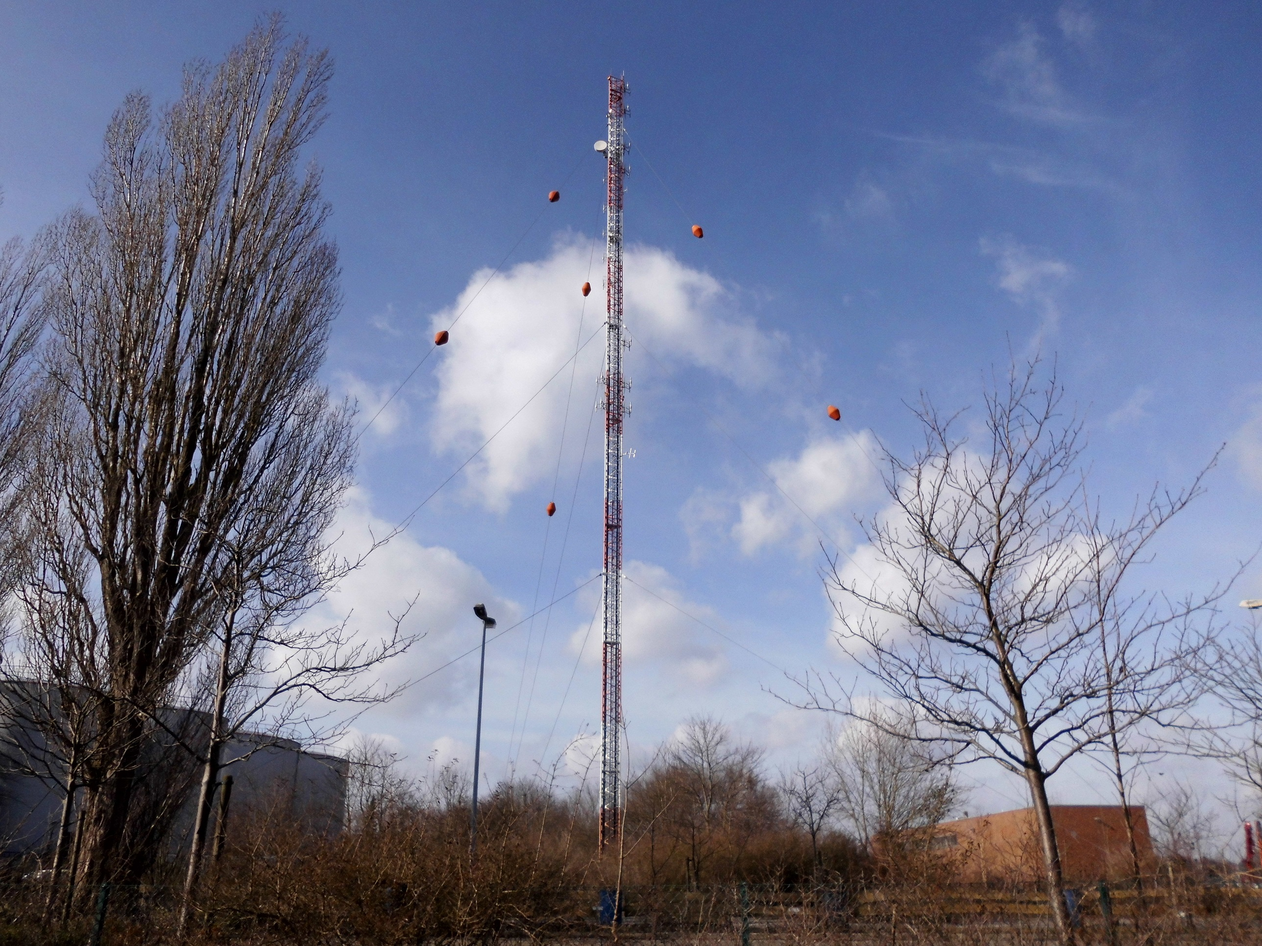 Stahlfachwerkmast im Kieler Stadtteil Wik.